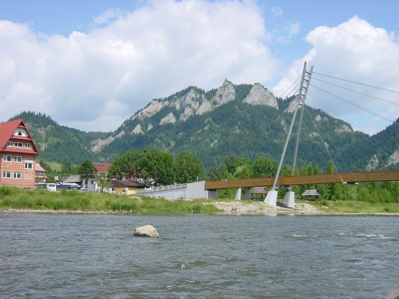 Pieniny, Poland